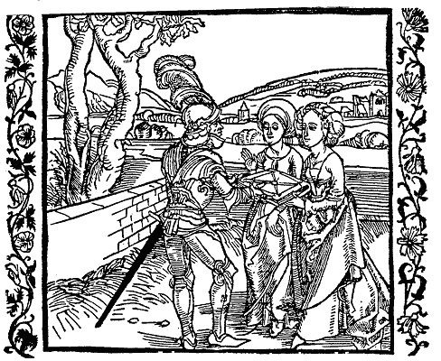 Der Ritter vom Turn. Basel: Michael Furter für J[ohann] B[ergmann], 1493. Reprint: Kautzsch, Rudolf. Die Holzschnitte zum Ritter vom Turn (Basel 1493). Strasbourg: Heitz & Mündel, 1903.